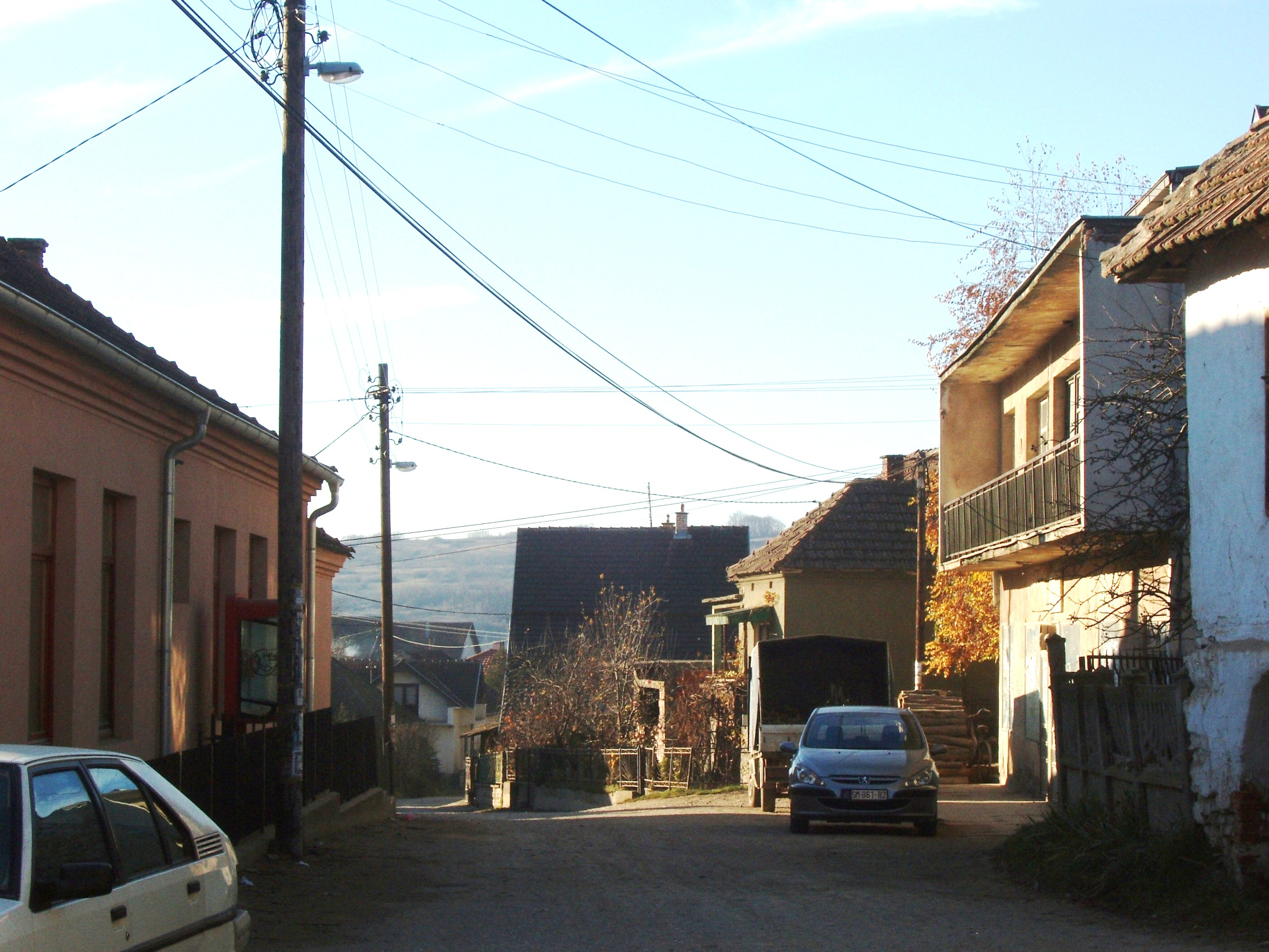 Смиловац - средиште - Smilovac - Centre.JPG